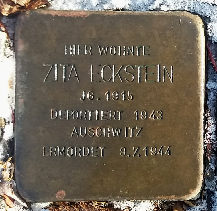 Stolperstein für Zita Eckstein, Mitglied der Großfamilie Eckstein, Vöhringen (Iller)